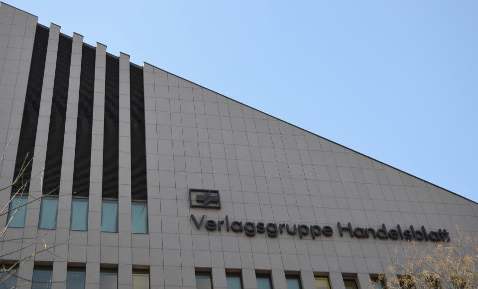 Gebäude der Verlagsgruppe Handelsblatt in Düsseldorf